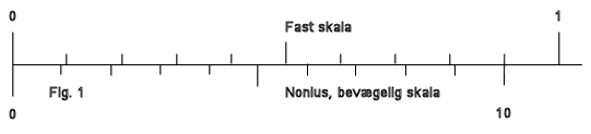 Nonius nulpunkt.